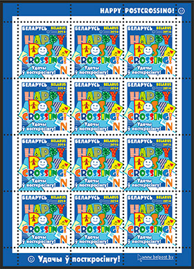 Паштовая марка Беларусі